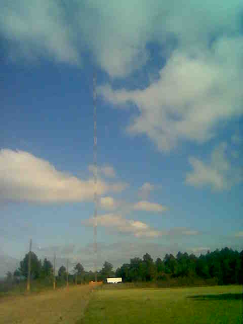 Torre de uma Ionosonda. VLF - Potência 1.300.000 W. Este equipamento se destina ao estudo da AMAS, Anomalia Magnética do Atlântico Sul.